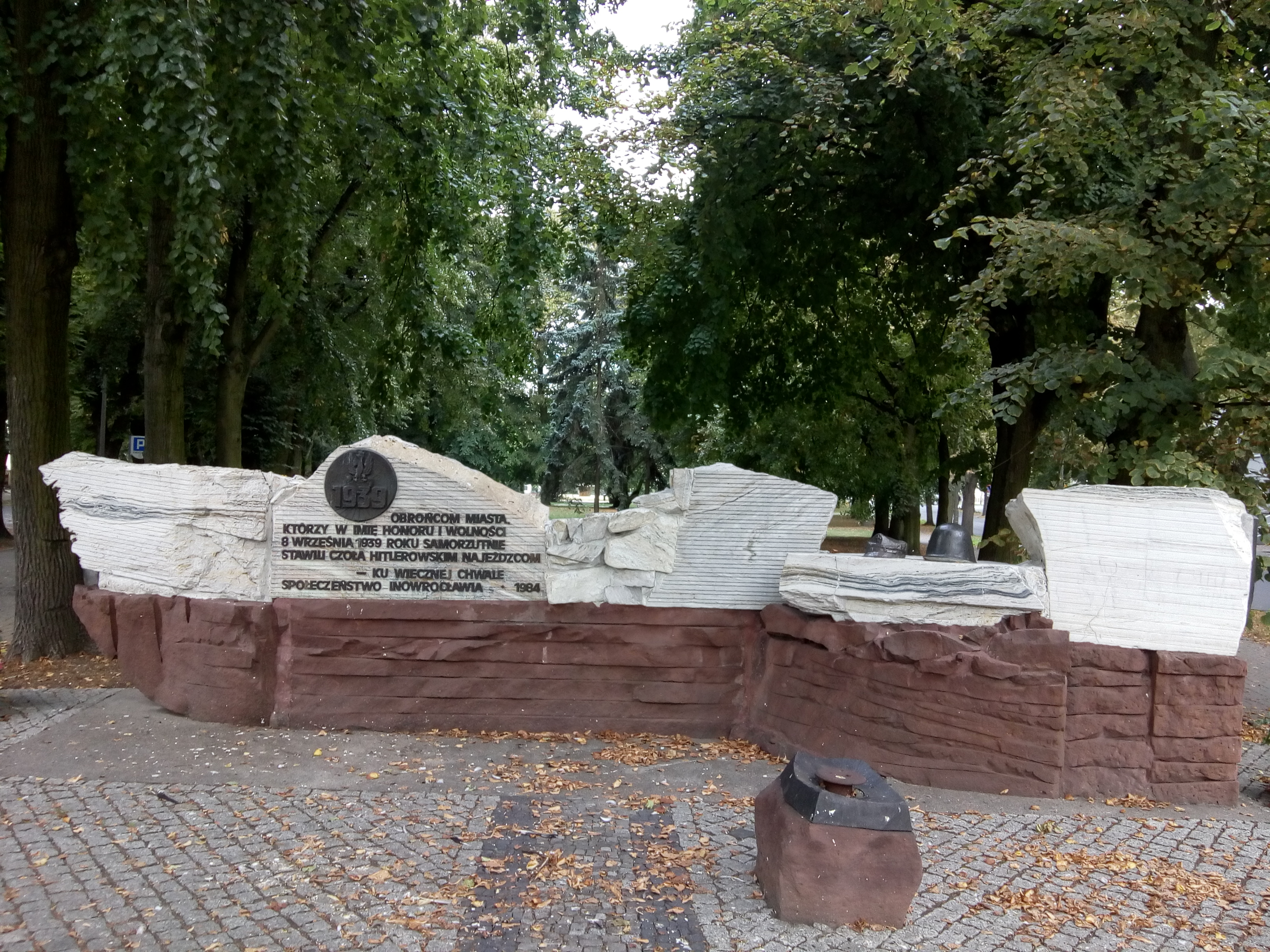 Inskrypcje: Front: "OBROŃCOM MIASTA, KTÓRZY W IMIĘ HONORU I WOLNOŚCI 8 WRZEŚNIA 1939 ROKU SAMORZUTNIE STAWILI CZOŁA HITLEROWSKIM NAJEŹDŹCOM – KU WIECZNEJ CHWALE SPOŁECZEŃSTWO INOWROCŁAWIA – 1984" Tył: "TWIERDZĄ NAM BĘDZIE KAŻDY PRÓG" zlokalizowany na wschodnim krańcu Skweru Obrońców Inowrocławia